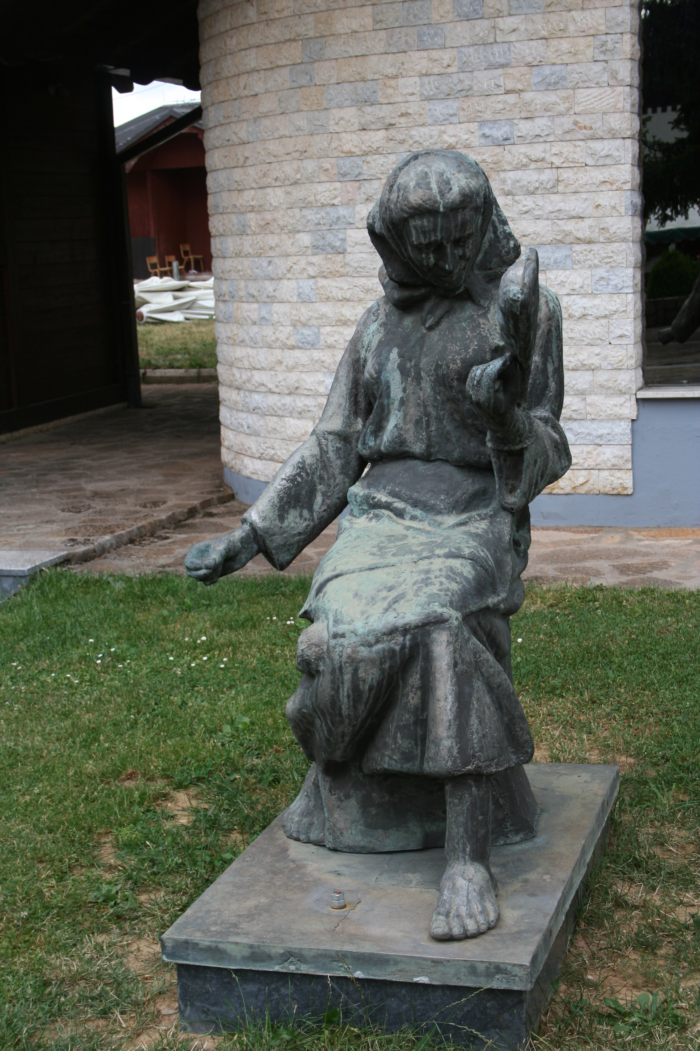 Muzej pletilja, Sirogojno